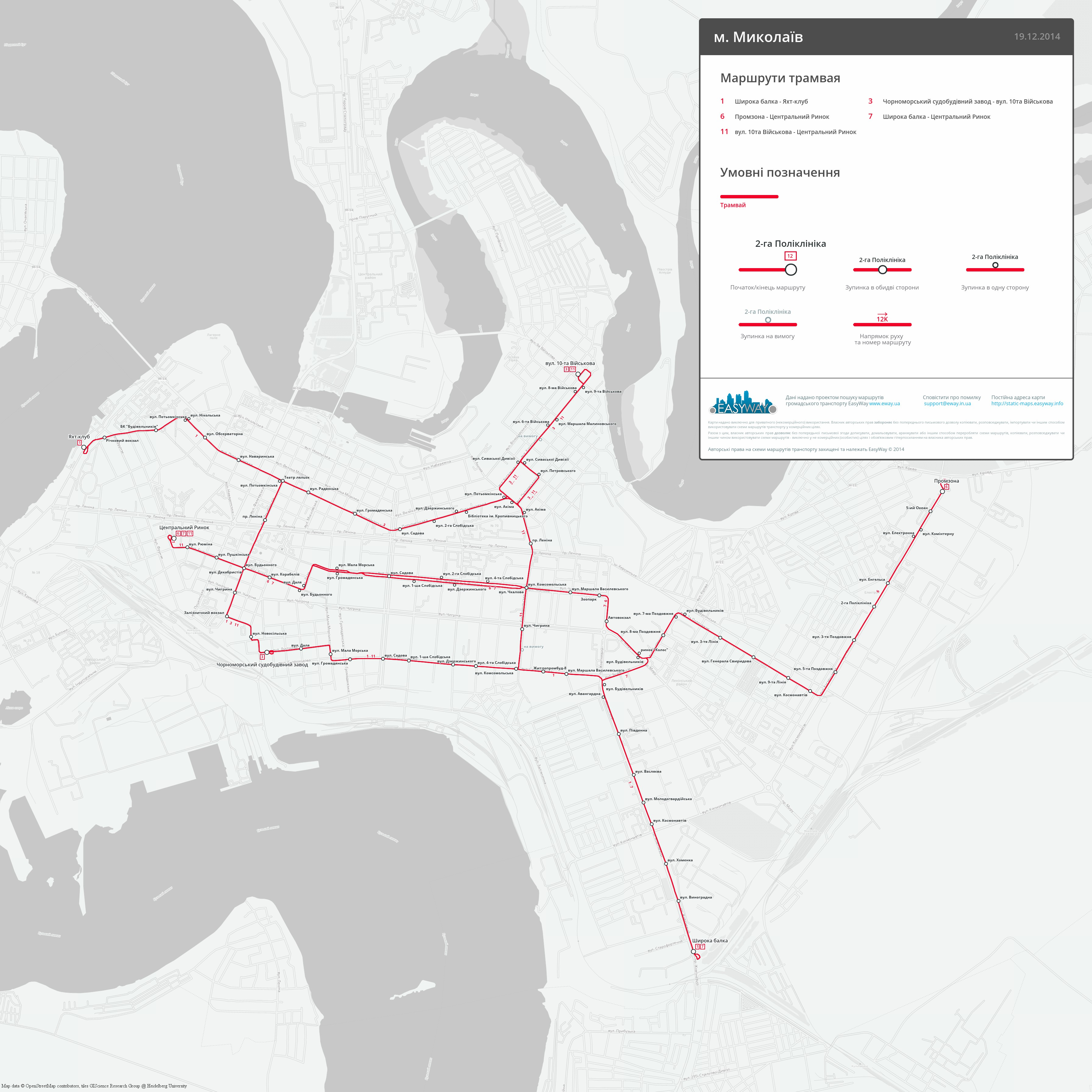 Схема трамвайних маршрутів у місті Миколаїв